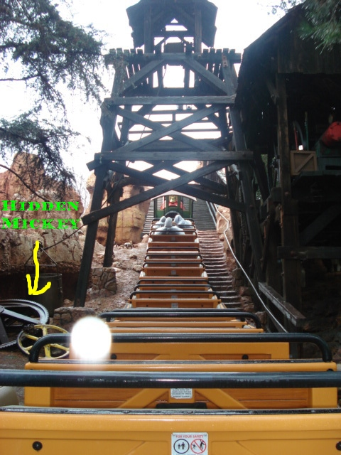 Hidden Mickey